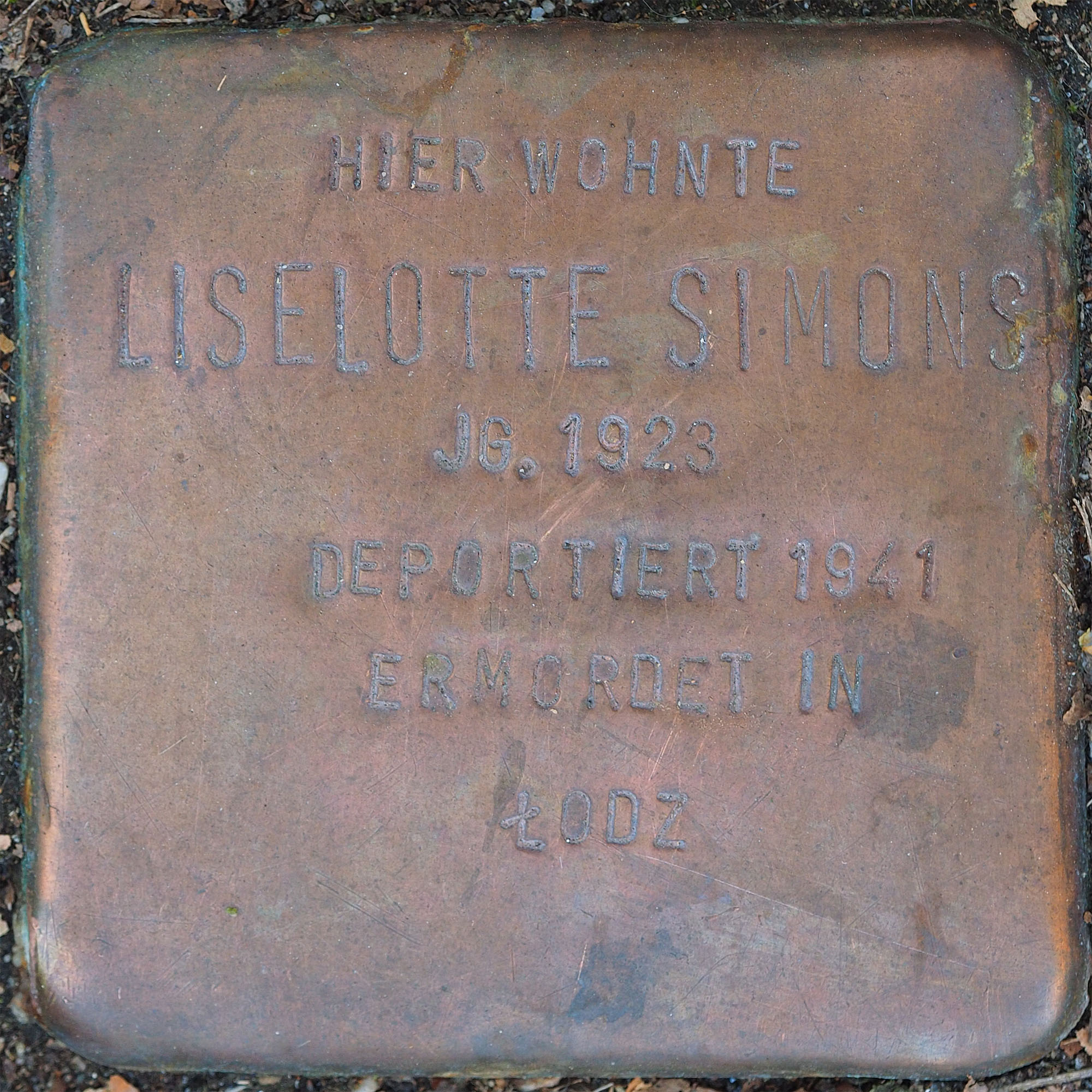 Stolperstein VIE: Simons, Lieselotte